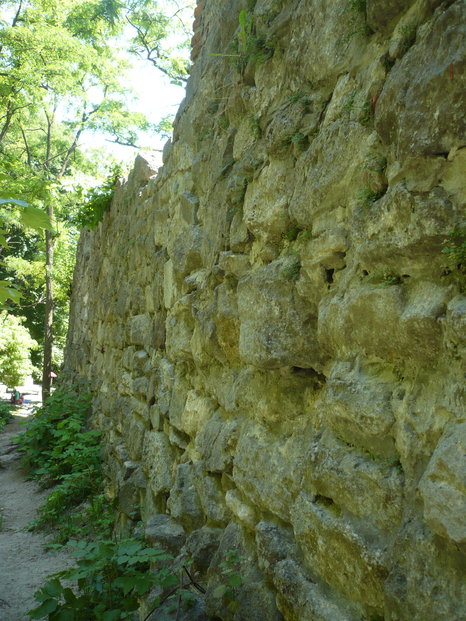 Lwów. Wysoki Zamek